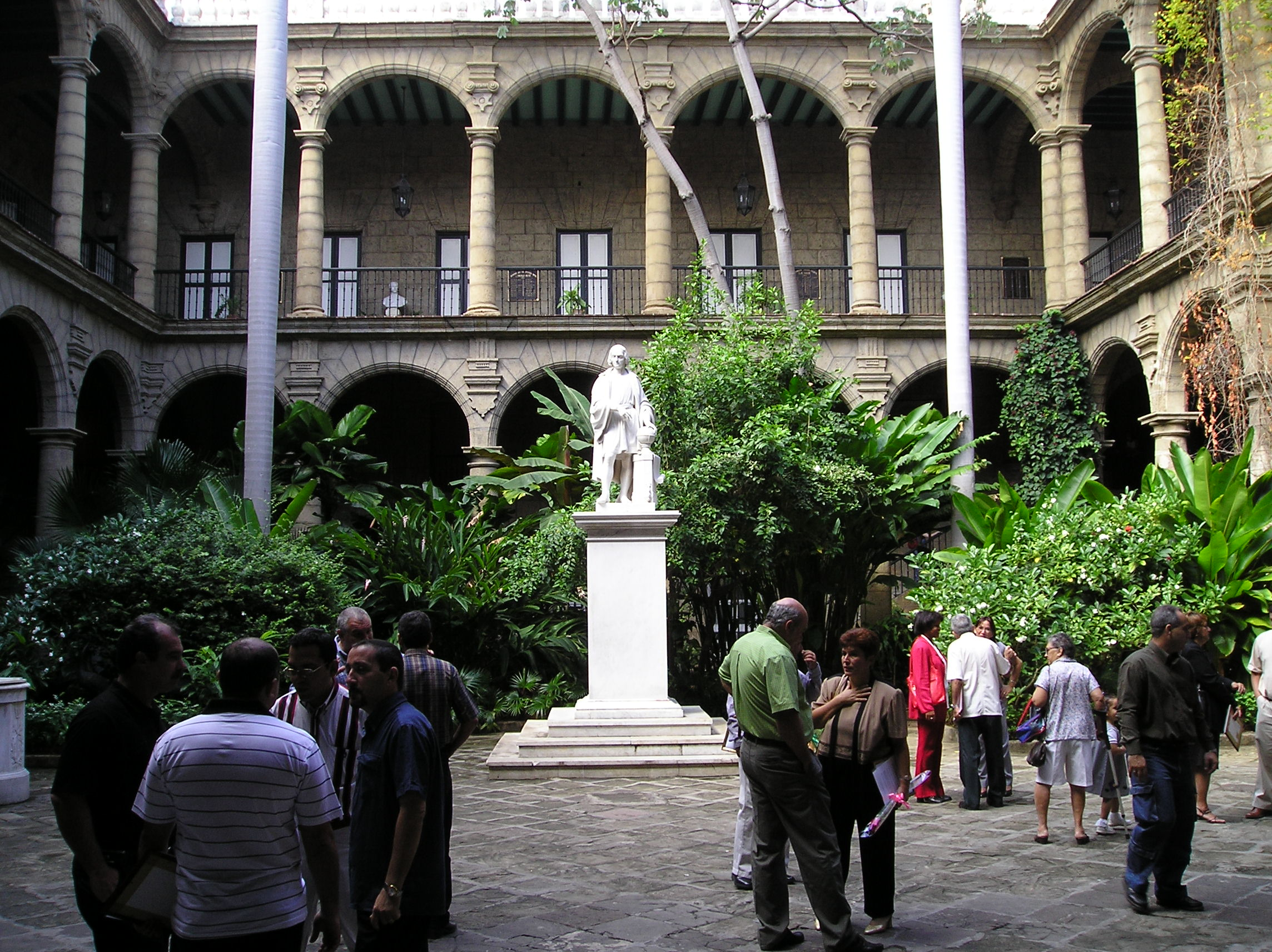 Binnenplaats Palacio de los Capitanes Generales. Eigen foto